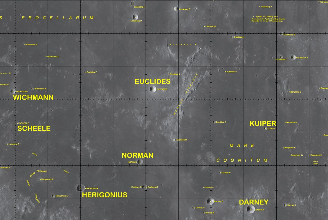 Cráter lunar Euclides. Cráteres satélite. (Imagen LROC)